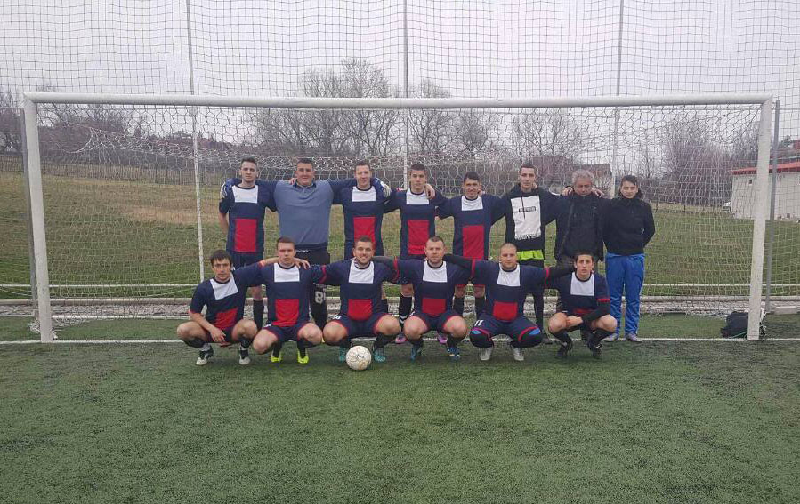 Српски (ћирилица): ФК Мареново (Први тим)